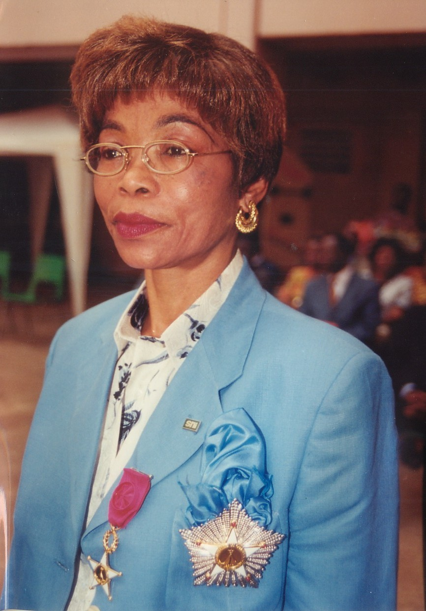 Remise de la médaille de Grand Officier de l'Ordre National de la Valeur et de la médaille d'Honneur du Travail en Or